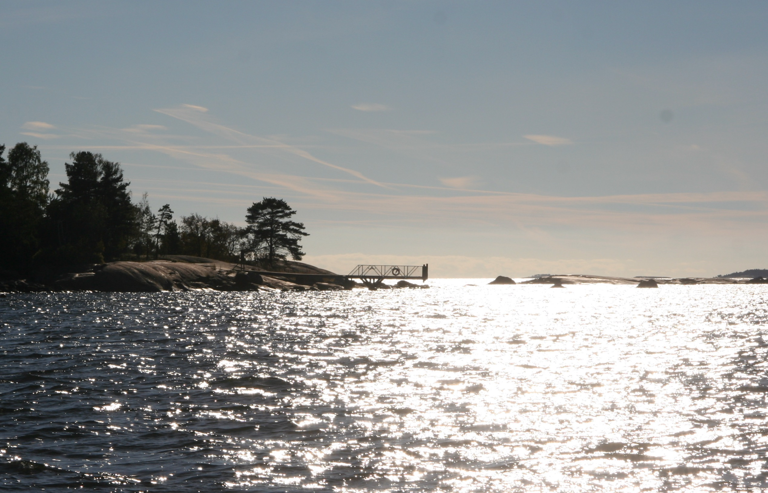 Laituri Torra Lövössä.